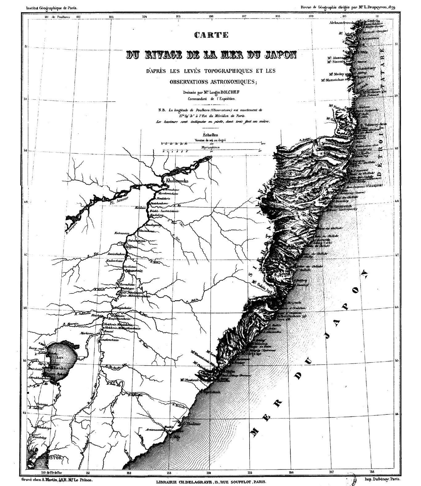 Carte du rivage de la Mer du Japon, d'après les levés topographiques et les observations astronomiques; Dréssée par mr. Longin Bolshef, commandant de l'expédition. 1874.